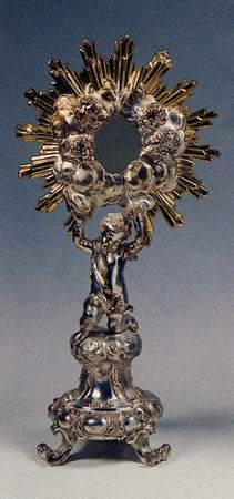 Museo dell'operta del duomo, prato, ostensorio del primo Settecento